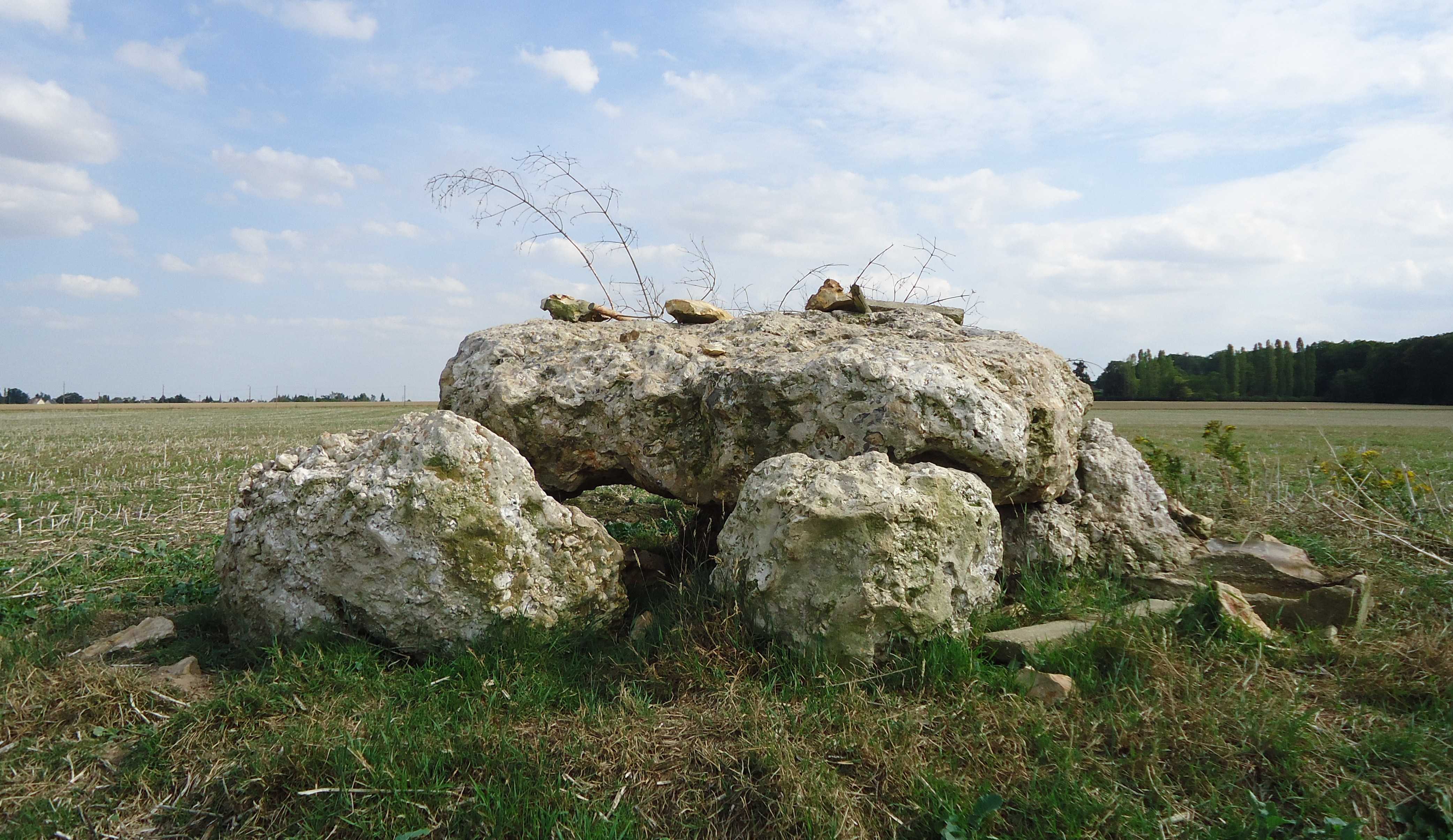 Les Ventes - Dolmen de l'Hotel-Dieu dite Pierre des Druides